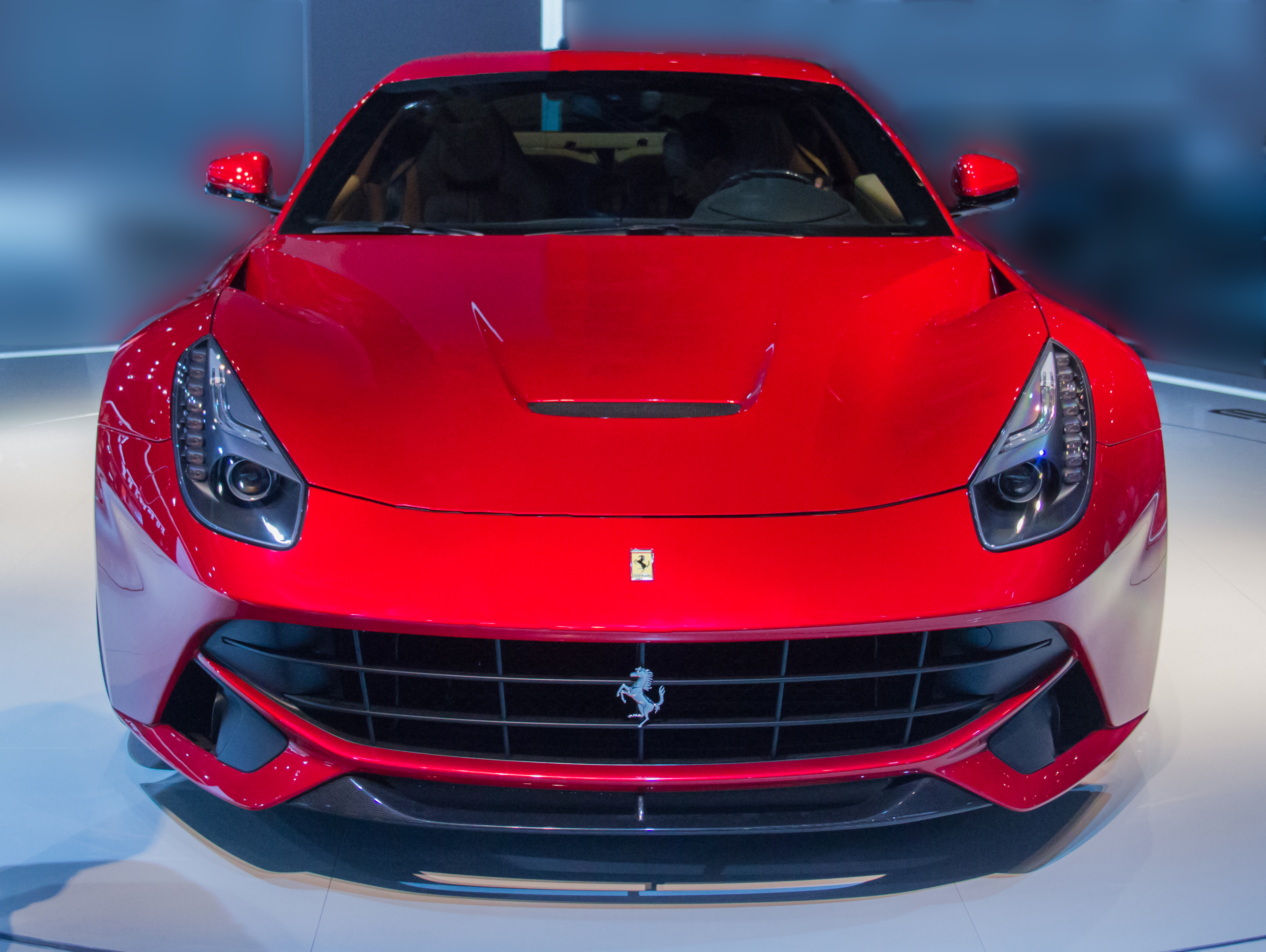 Mondial de l’Automobile de Paris 2012.